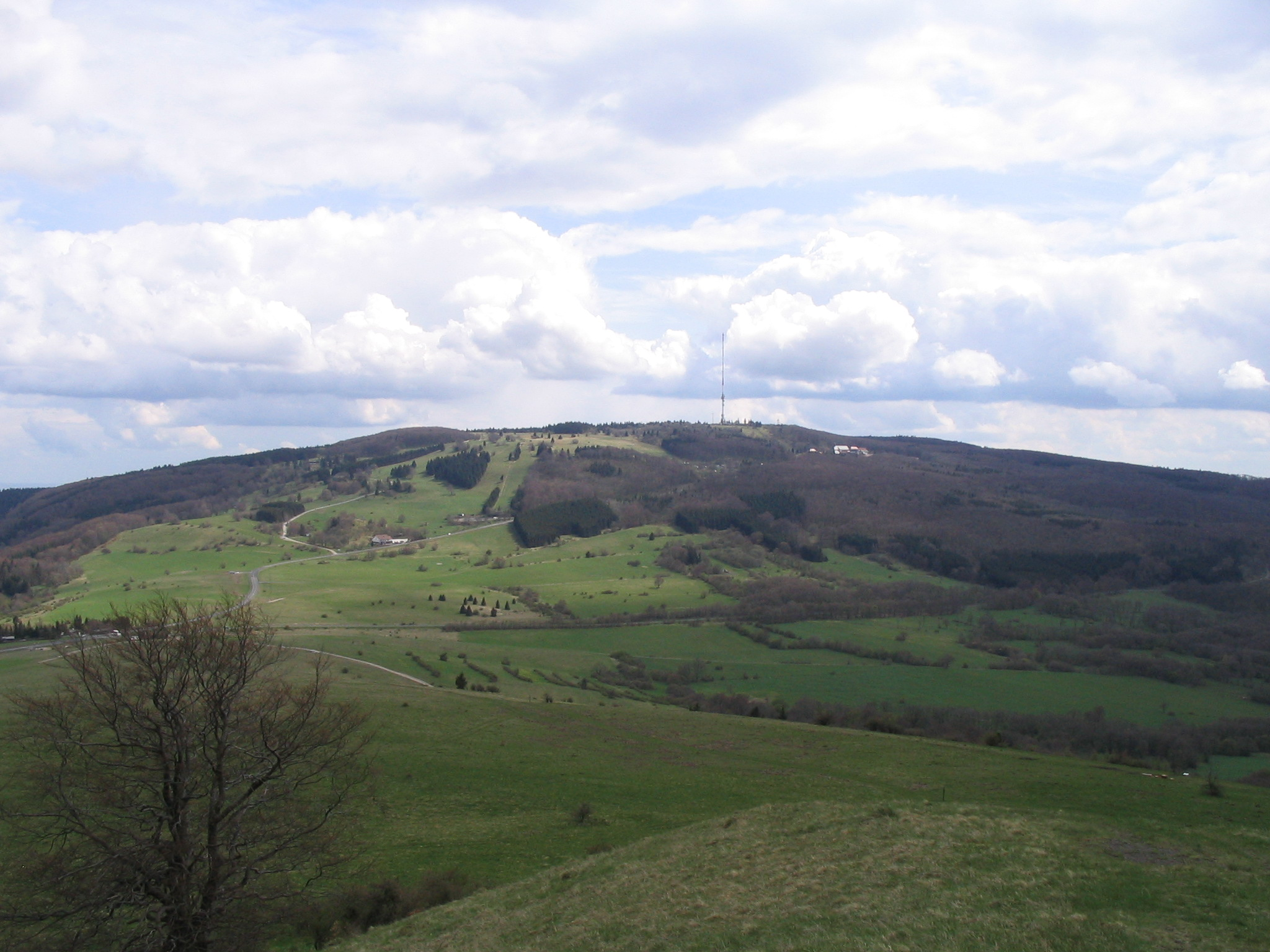 Blick vom Arnsberg (843 m) nach Süden zum Kreuzberg (928 m), dem dritthöchsten Berg der Rhön